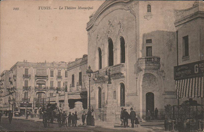 Tunis Théatre Municipal